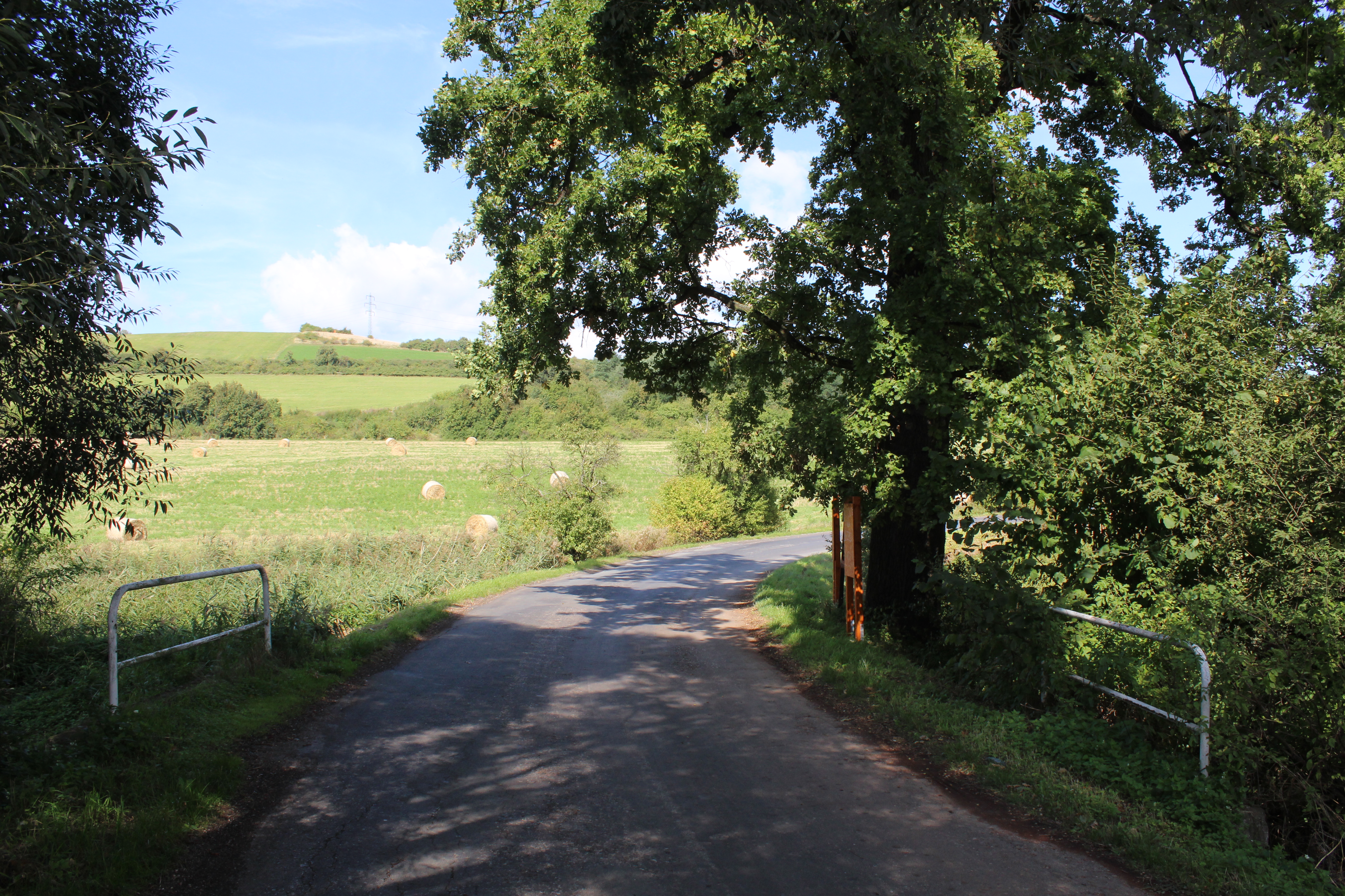 Pohled na Dub letní (jedno ze zastavení Naučné stezky Liteň) v zatáčce ulice Pod Babkou (lokalita Pod Cihelnou). Na snímku kromě chráněného stromu i informační panely a lavička Naučné stezky a plot Obory Pod Cihelnou. Naučná stezka Liteň nabízí turistům a návštěvníkům procházku nebo projížďku na kole po pozoruhodnostech malebného městyse Liteň v okrese Beroun.